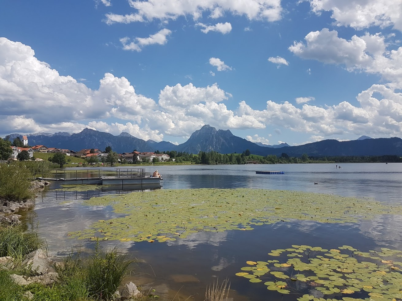 Hopfensee: Blick vom Nordufer auf Hopfen am See mit den Allgäuer Alpen im Hintergrund (Sommer 2017)